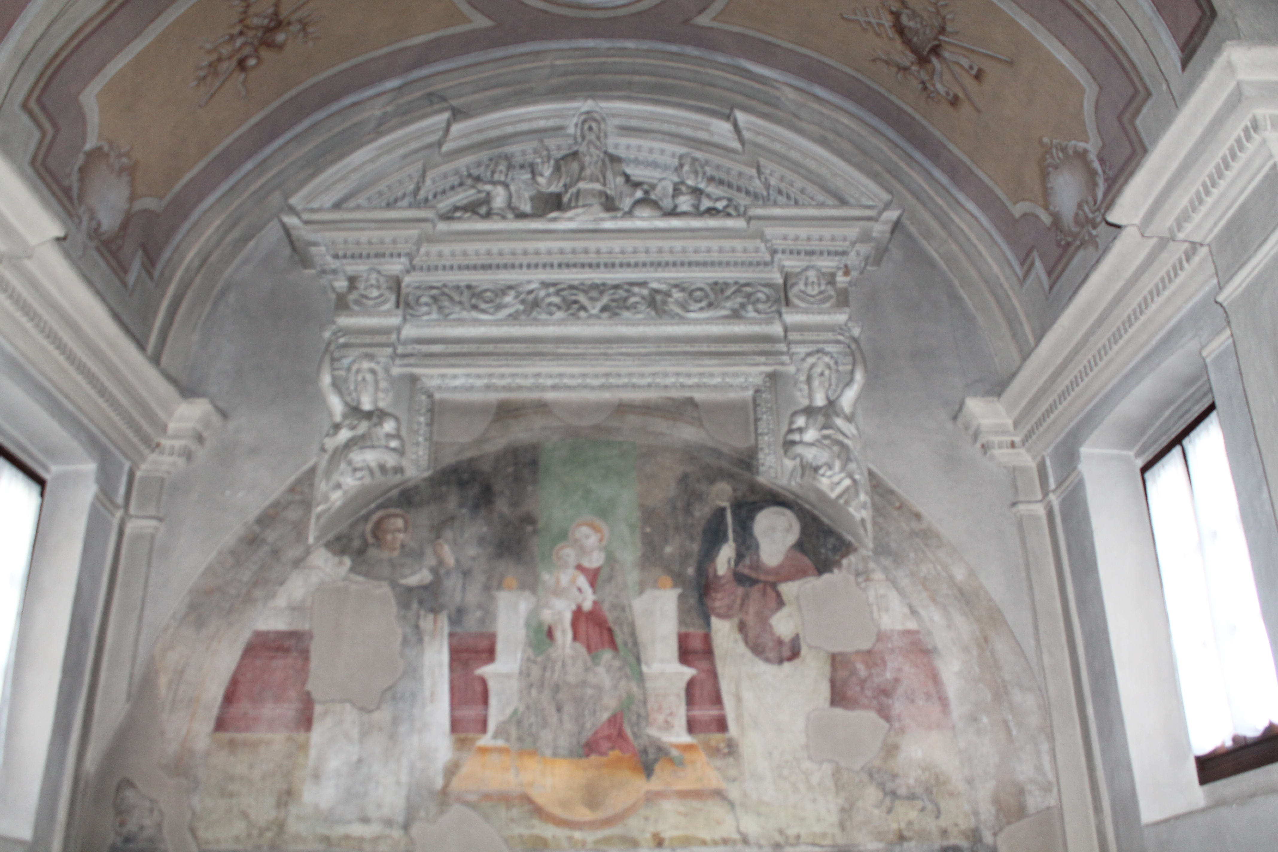 Affresco nella Chiesa di S. Marino a Castelcovati.